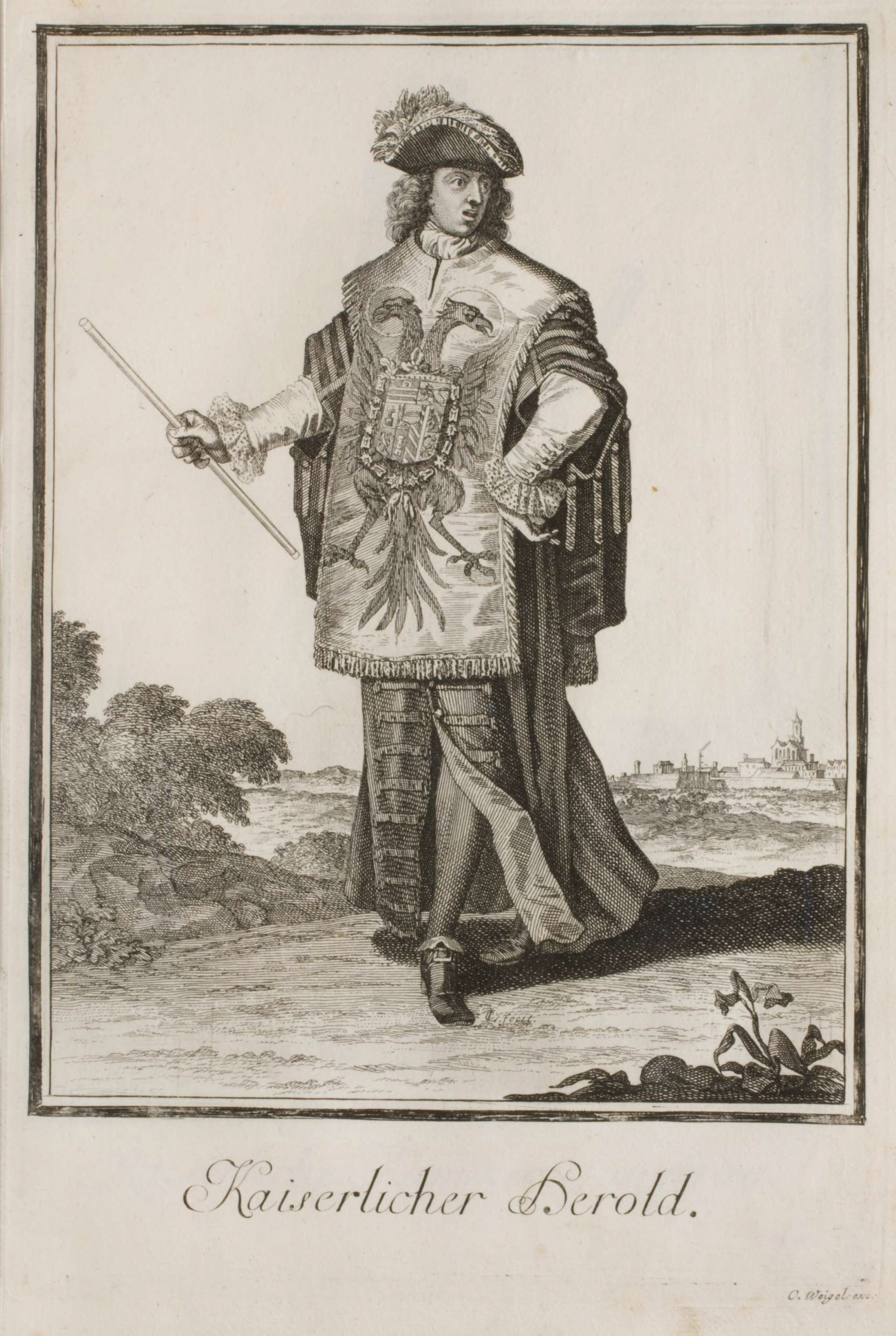 Neu-eröffnete Welt-Galleria. ..., Nürnberg 1703. 22. Kaiserlicher Herold.